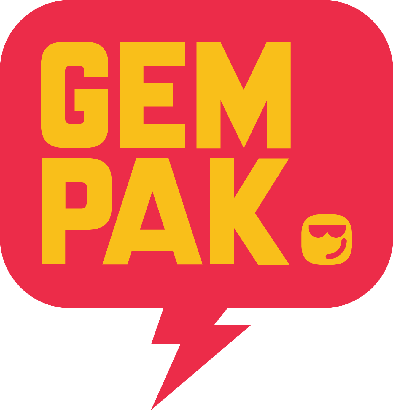 Logo rasmi